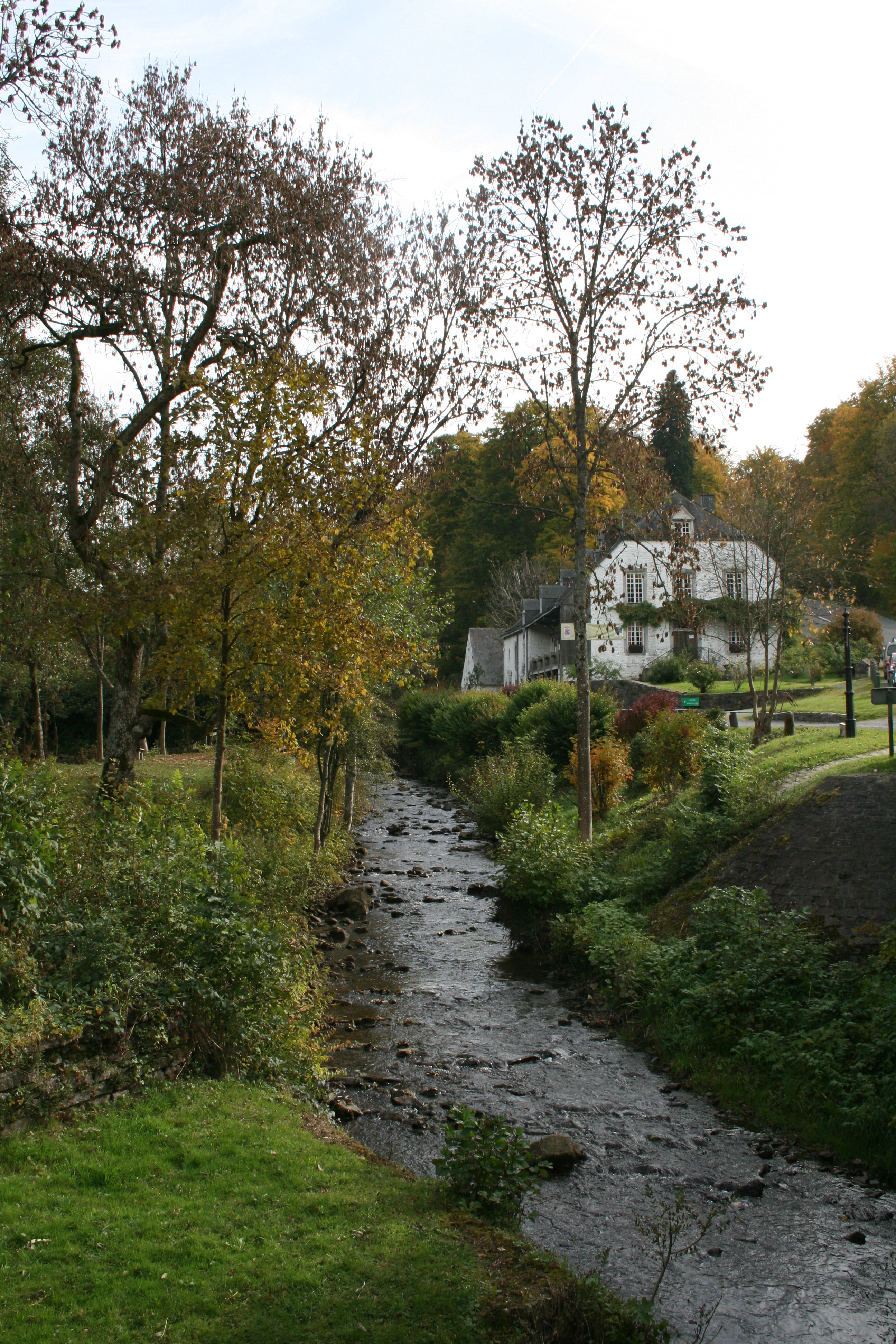 La rivière Masblette dans la province de Luxembourg en Belgique et le Fourneau Saint-Michel.